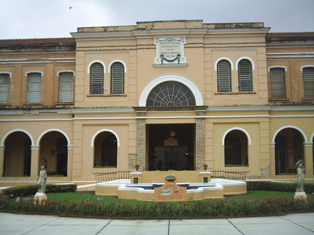 Memorial do Imigrante, Mooca, São Paulo.